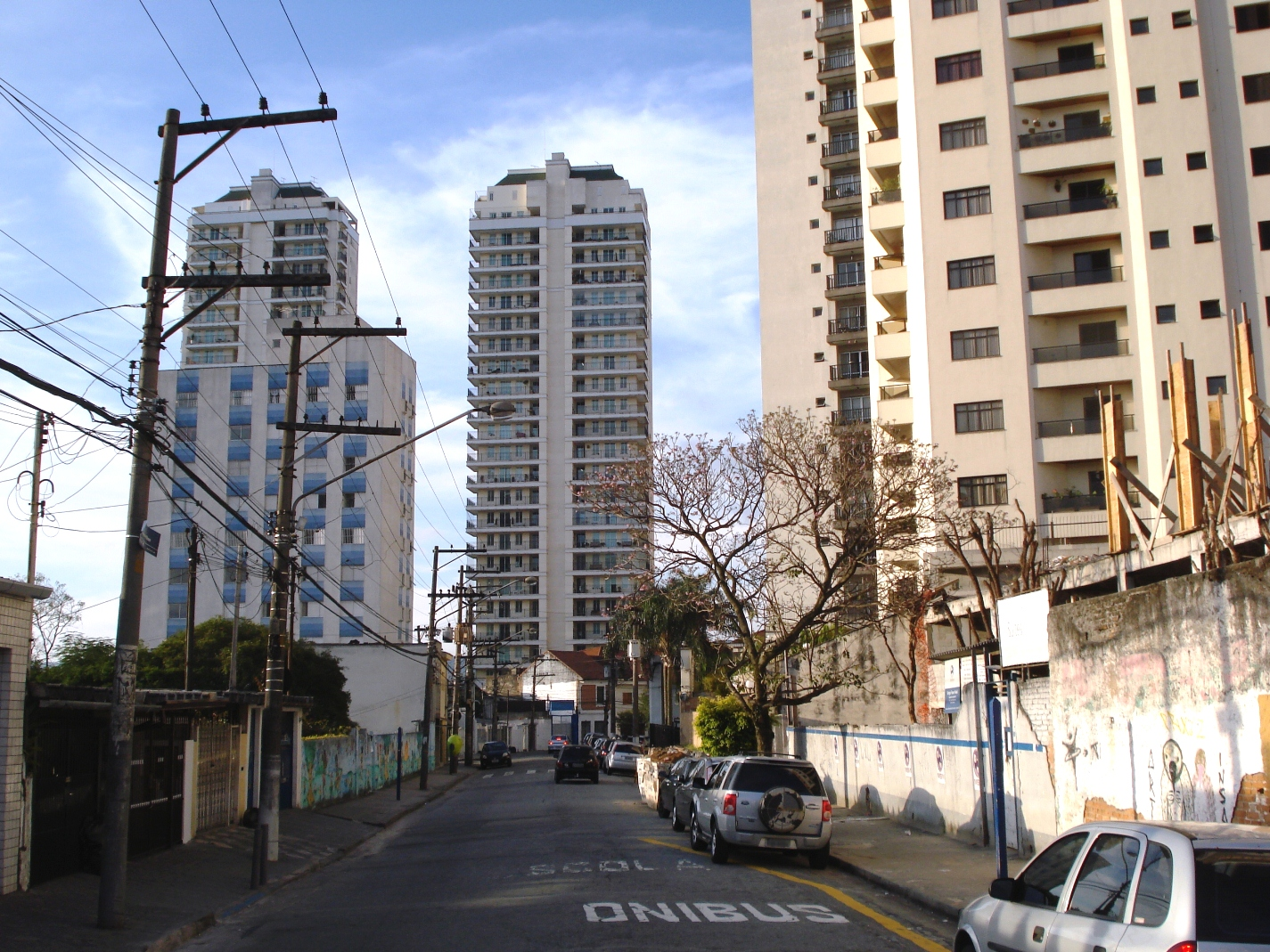 Água Fria, bairro do distrito de Santana, zona norte de São Paulo, SP, Brasil.